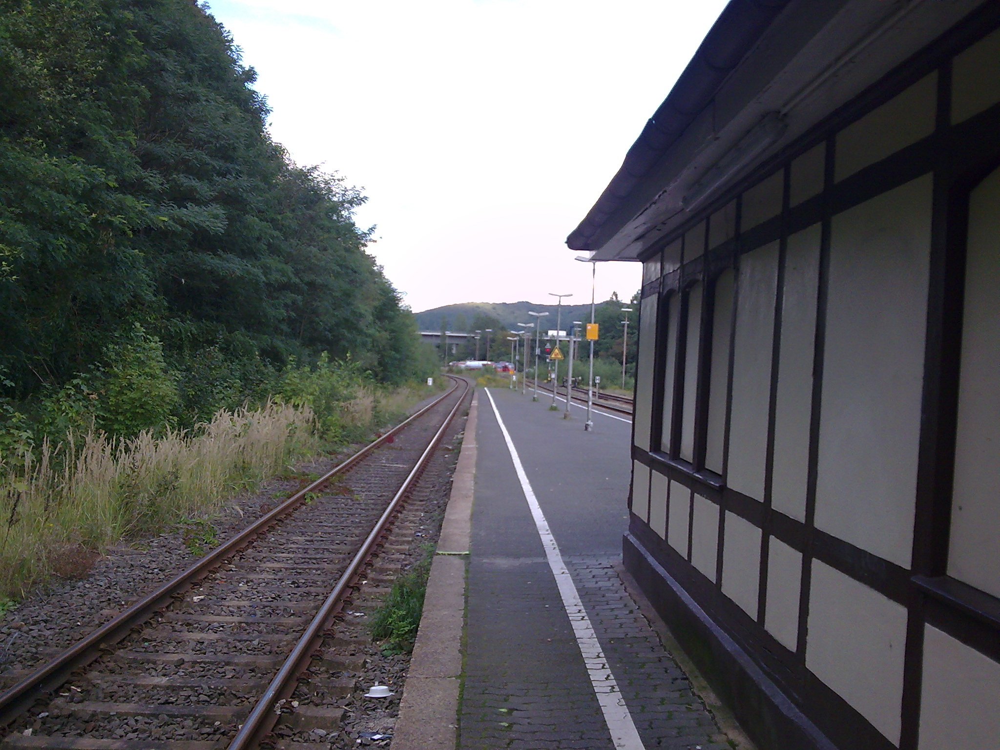 Blick zum östlichen Bahnhofsbereich, Dieringhausen